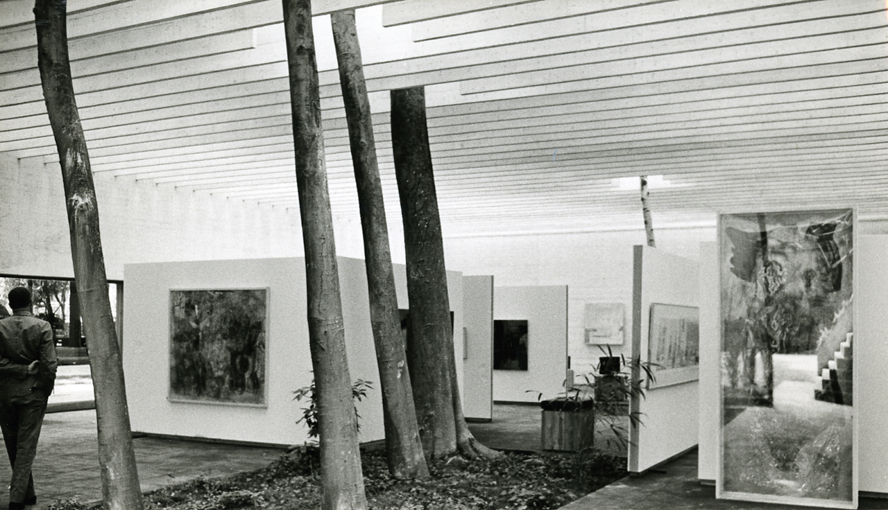 Servizio fotografico : Venezia, 1962 / Paolo Monti. - Stampe: 6 : Positivo b/n, gelatina bromuro d'argento/ carta, 13x18, 18x24, 24x30. - ((Sul coperchio della scatola iscrizione didascalica manoscritta a pennarello nero: "Archit. Moderna/ Musei". - Nell'agenda citata nel campo Fonti in corrispondenza del numero di negativo (formato 35 mm) corrispondente iscrizione documentaria e didascalica: "6/13 [fotogrammi] padiglione paesi nordici". - La XXXI Biennale Internazionale d'Arte di Venezia si tenne nel periodo 16 giugno - 7 ottobre 1962. - Occasione: Documentazione della XXI Biennale di Venezia, 1962. - Fonte: Quaderno di Paolo Monti: Foto Leica 1 / 1-51 verde, 1-110 nera (1958-1963), presso Archivio Paolo Monti